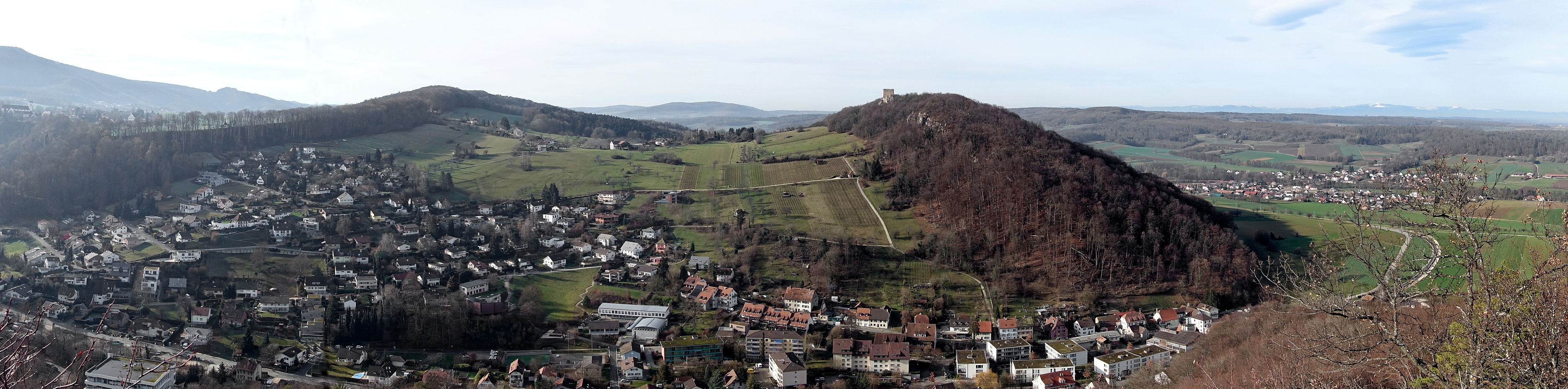 Panoramablick zur Burg Landskron (Oberelsass) vom Hofstetter-Chöpfli aus gesehen